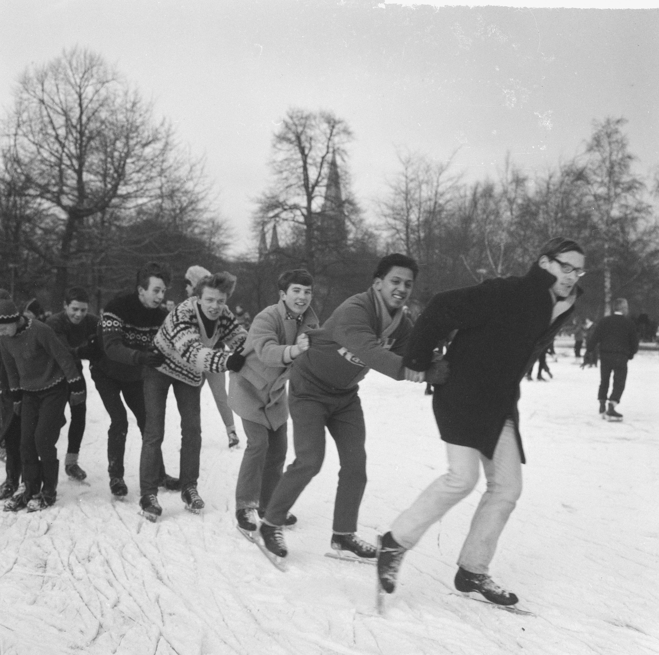 Collectie / Archief : Fotocollectie Anefo Reportage / Serie : [ onbekend ] Beschrijving : IJspret in het Vondelpark, schaatsen op vijver in Vondelpark Datum : 29 december 1964 Locatie : Amsterdam, Noord-Holland, Vondelpark Trefwoorden : SCHAATSEN, ijspret, sport, vijvers Fotograaf : Gelderen, Hugo van / Anefo Auteursrechthebbende : Nationaal Archief Materiaalsoort : Negatief (zwart/wit) Nummer archiefinventaris : bekijk toegang 2.24.01.03 Bestanddeelnummer : 917-2845